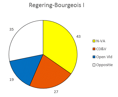 Samenstelling regering-Bourgeois I